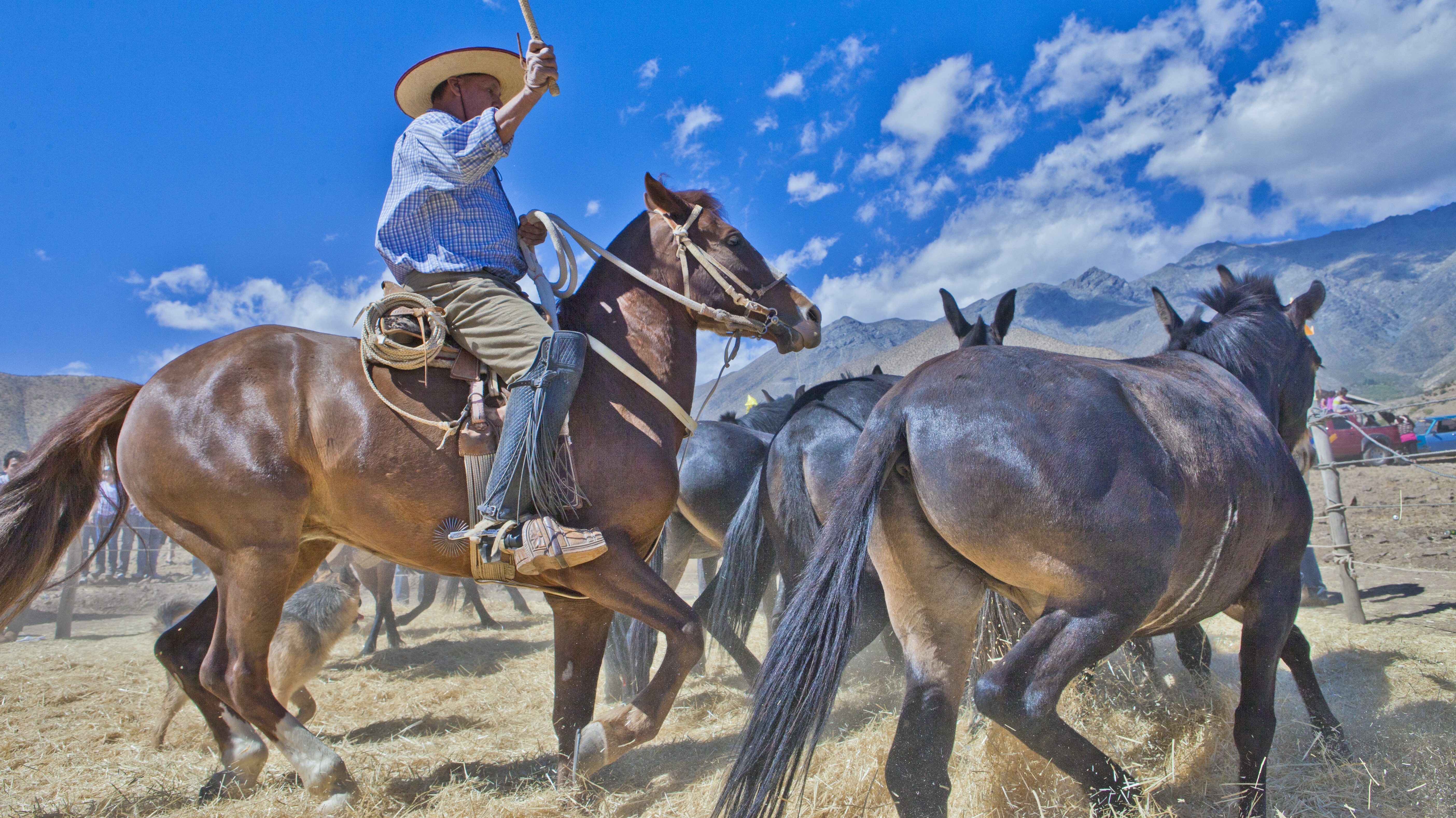 Se representa la trilla en el campo